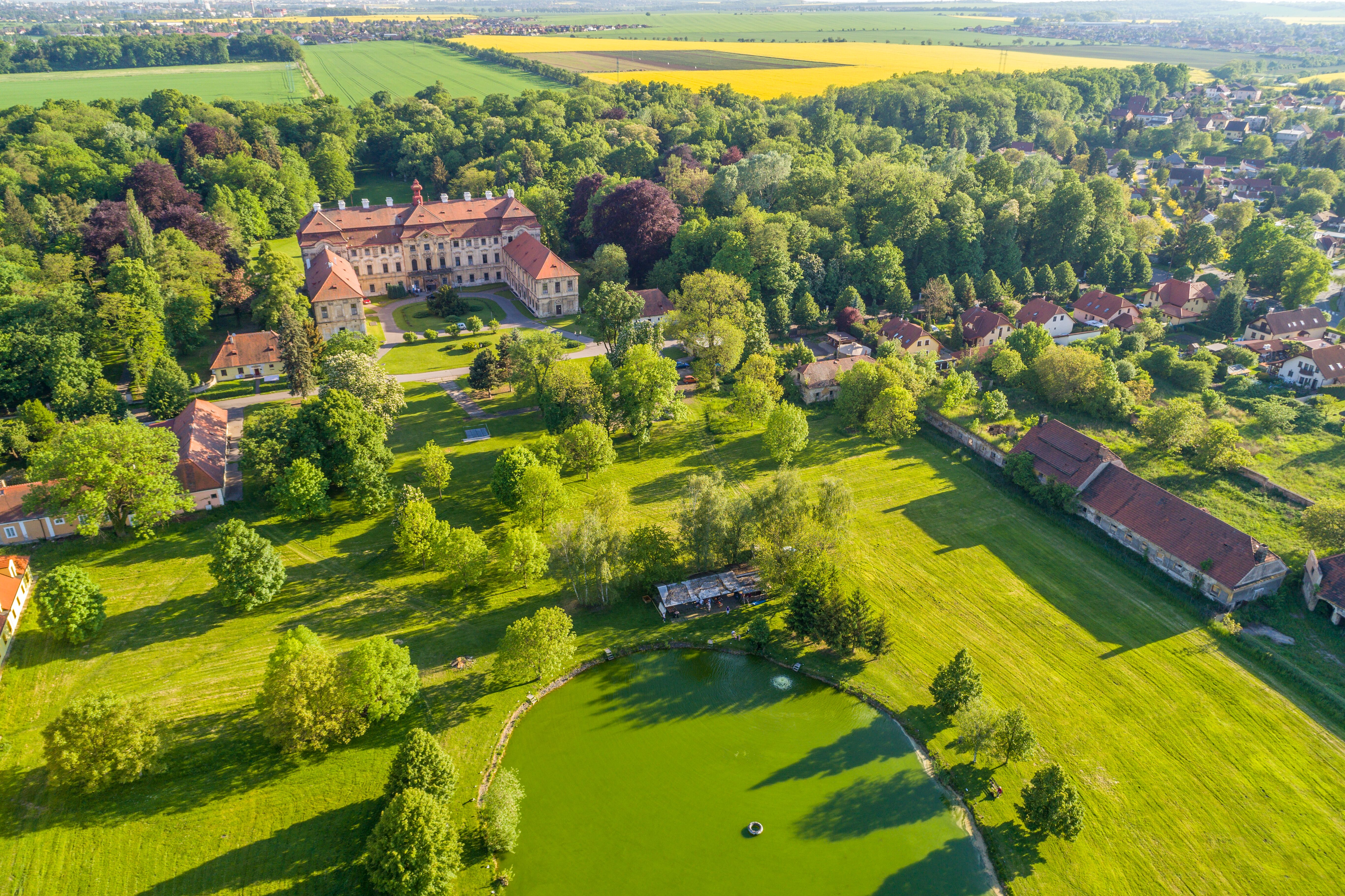 Zámek Měšice. V pozadí zámecký park spolu s bažantnicí Na křížku. V popředí část čestného dvora se západním hospodářským křídlem.